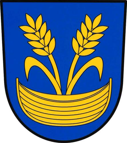 znak, Suchodol, okres Příbram